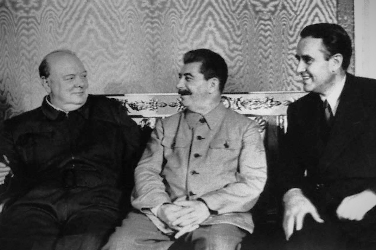 Московская конференция 12 по 17 августа 1942. Встреча Уинстона Черчилля, Иосифа Сталина и Аверелла Гарримана